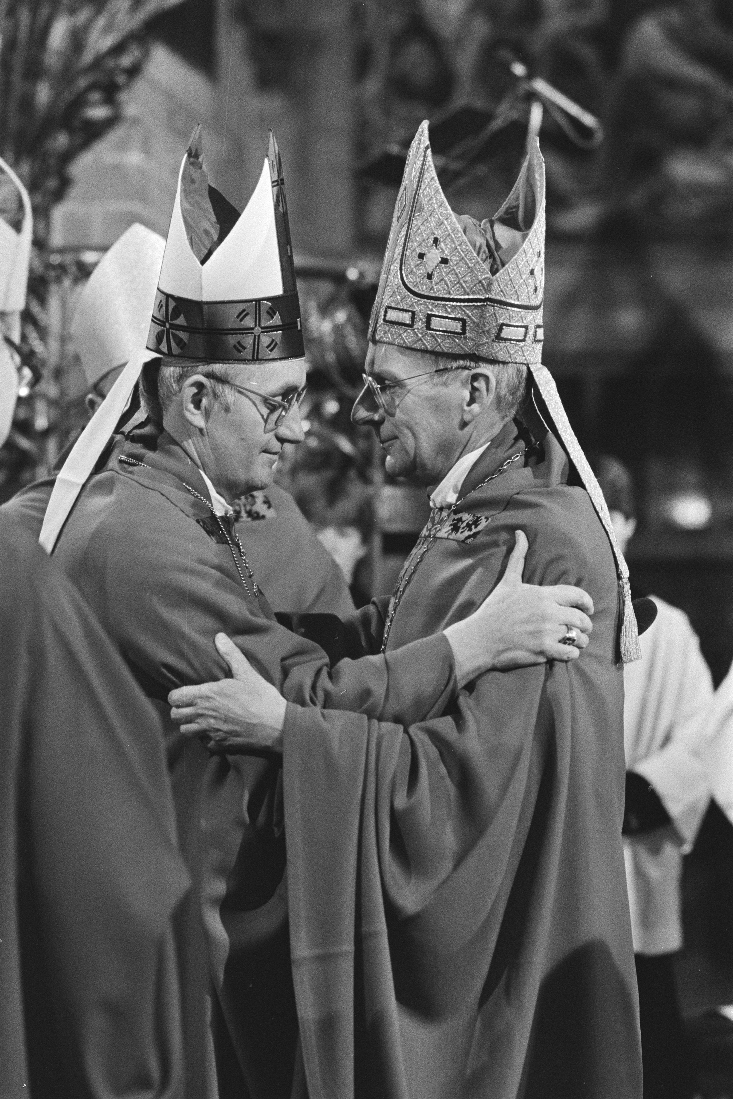 Collectie / Archief : Fotocollectie Anefo Reportage / Serie : [ onbekend ] Beschrijving : Installatie als bisschop van mgr. H.J.A. Bomers en tevens bisschopswijding van hulpbisschop mgr.dr.J.F. Lescrauwaet in St. Bavo in Haarlem Datum : 14 januari 1984 Locatie : Haarlem Trefwoorden : bisschoppen, installaties Persoonsnaam : Bomers, Henricus Instellingsnaam : Sint-Bavo Fotograaf : Antonisse, Marcel / Anefo Auteursrechthebbende : Nationaal Archief Materiaalsoort : Negatief (zwart/wit) Nummer archiefinventaris : bekijk toegang 2.24.01.05 Bestanddeelnummer : 932-8325